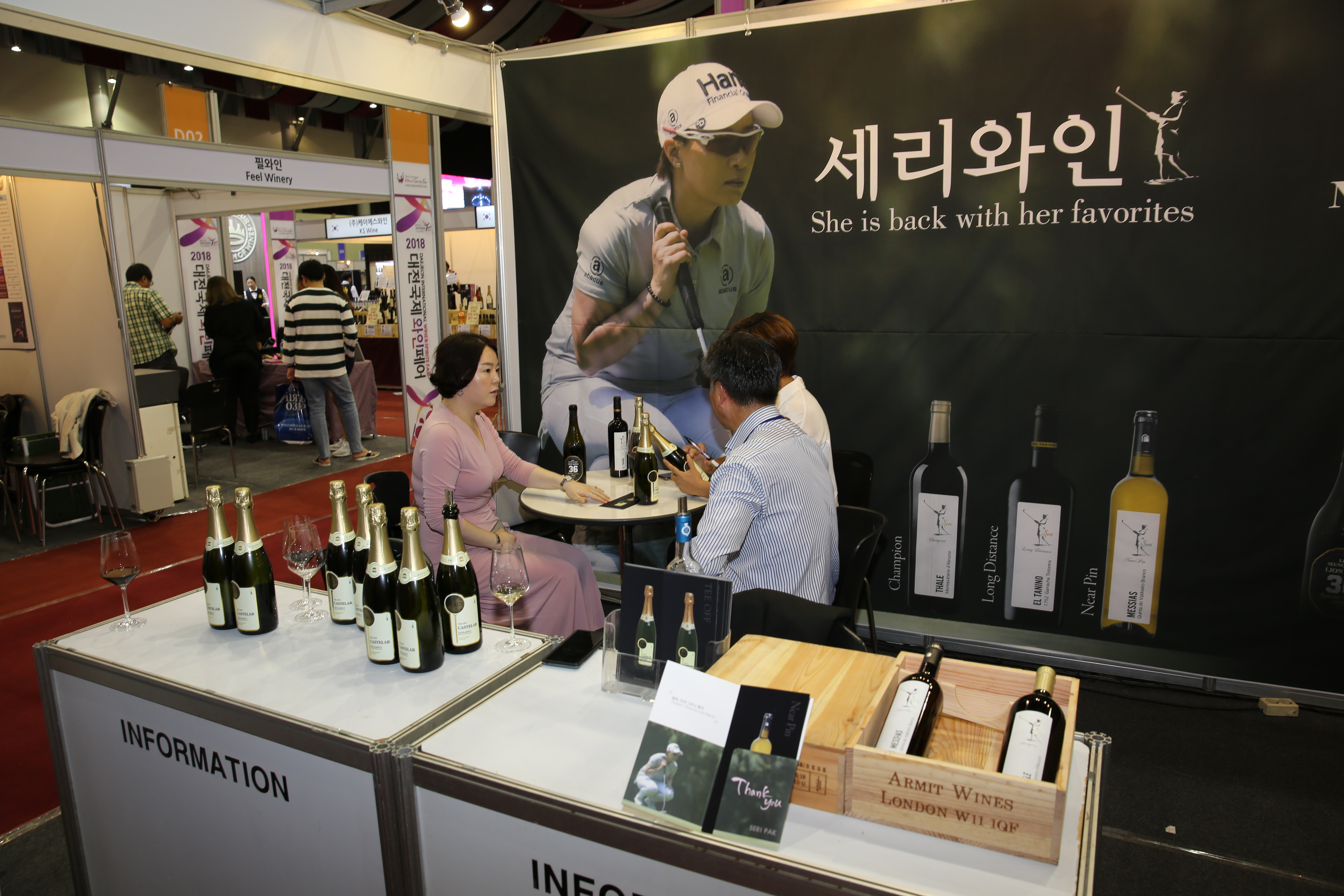 2018 대전국제와인페스티벌 8